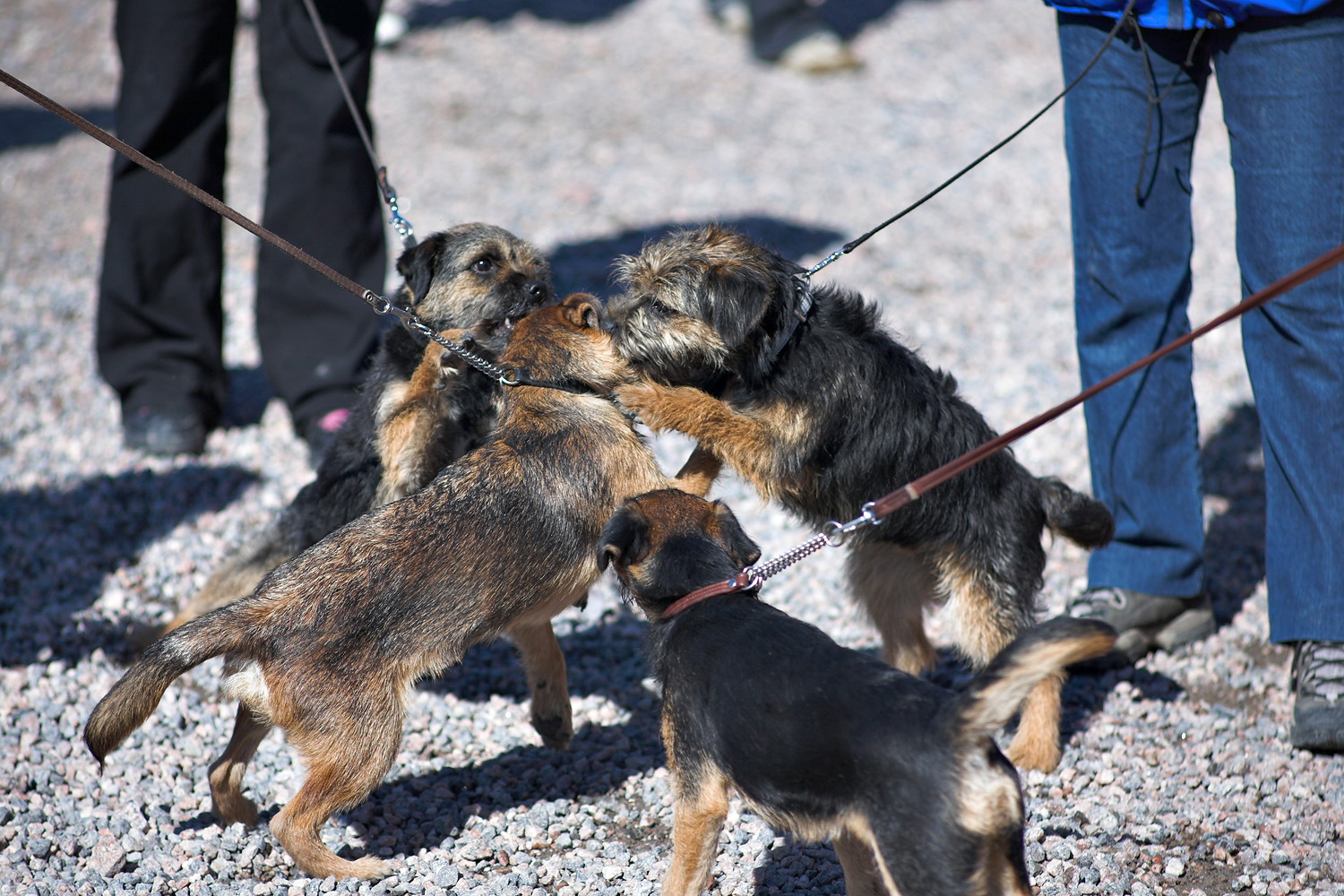 Border Terriers